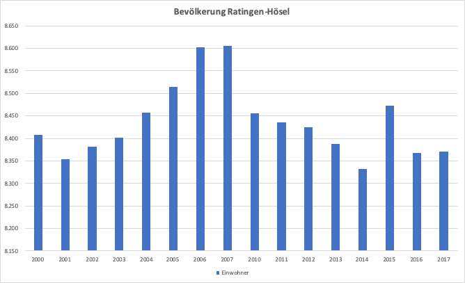 Einwohnerentwicklung von Ratingen-Hösel 2000-2017